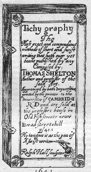 Catégorie:Écriture abrégée Première page du livre Tachygraphy de Thomas Shelton (publié en 1641). Texte On peut lire sur cette page : Tachy graphy The Most exact and compendious methode of short and swift writing that hath ever yet been published by any Composed by : Thomas Shelton Author and professor of the said Art. Approved by both Unyversities printed by the printer to the ? of CAMBRIDG R D and are sold at the professors house in Old Fish Streete neare Bread-Streetehill ?? 4?.1 My tongue is as the pen of A swift writer Ralph Hall sculptor